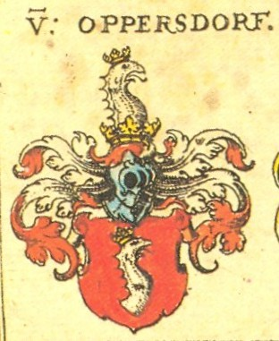 Stammwappen der Oppersdorff nach Johann Siebmacher: New Wappenbuch eingescannt aus: Horst Appuhn (Hrsg.), Johann Siebmachers Wappenbuch. Die bibliophilen Taschenbücher 538, 2. verb. Aufl, Dortmund 1989. Schlesische Blatt 65